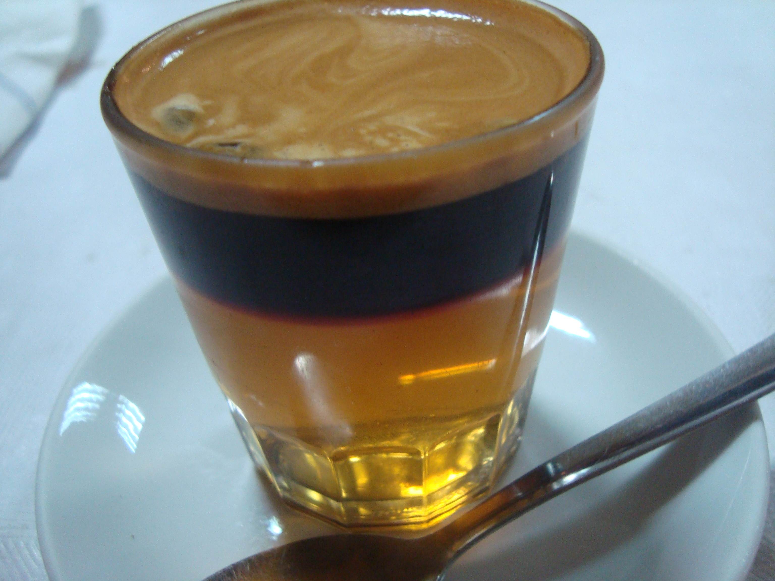 Carajillo cremat (Torreblanca)}Café-bar "Els Cavalls" en Avenida del Mar. Ingredientes: Licor quemado, azúcar, canela en rama, corteza de limón, granos de café y café expreso